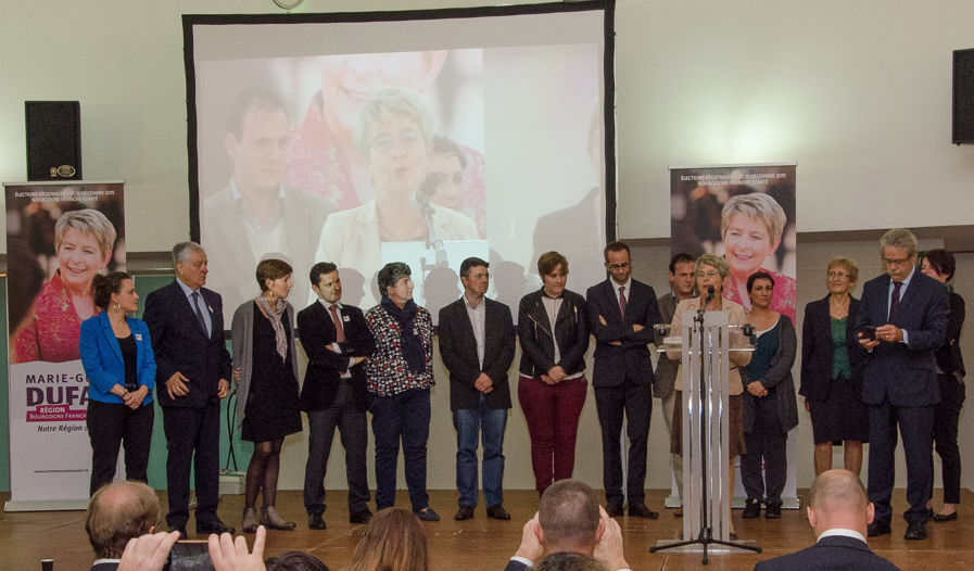 Marie-Guite Dufay, candidate aux élections régionales de 2015 dans la région Bourgogne Franche-Comté, présente sa liste à Dijon, lors d'une réunion organisée le 19 septembre 2015.